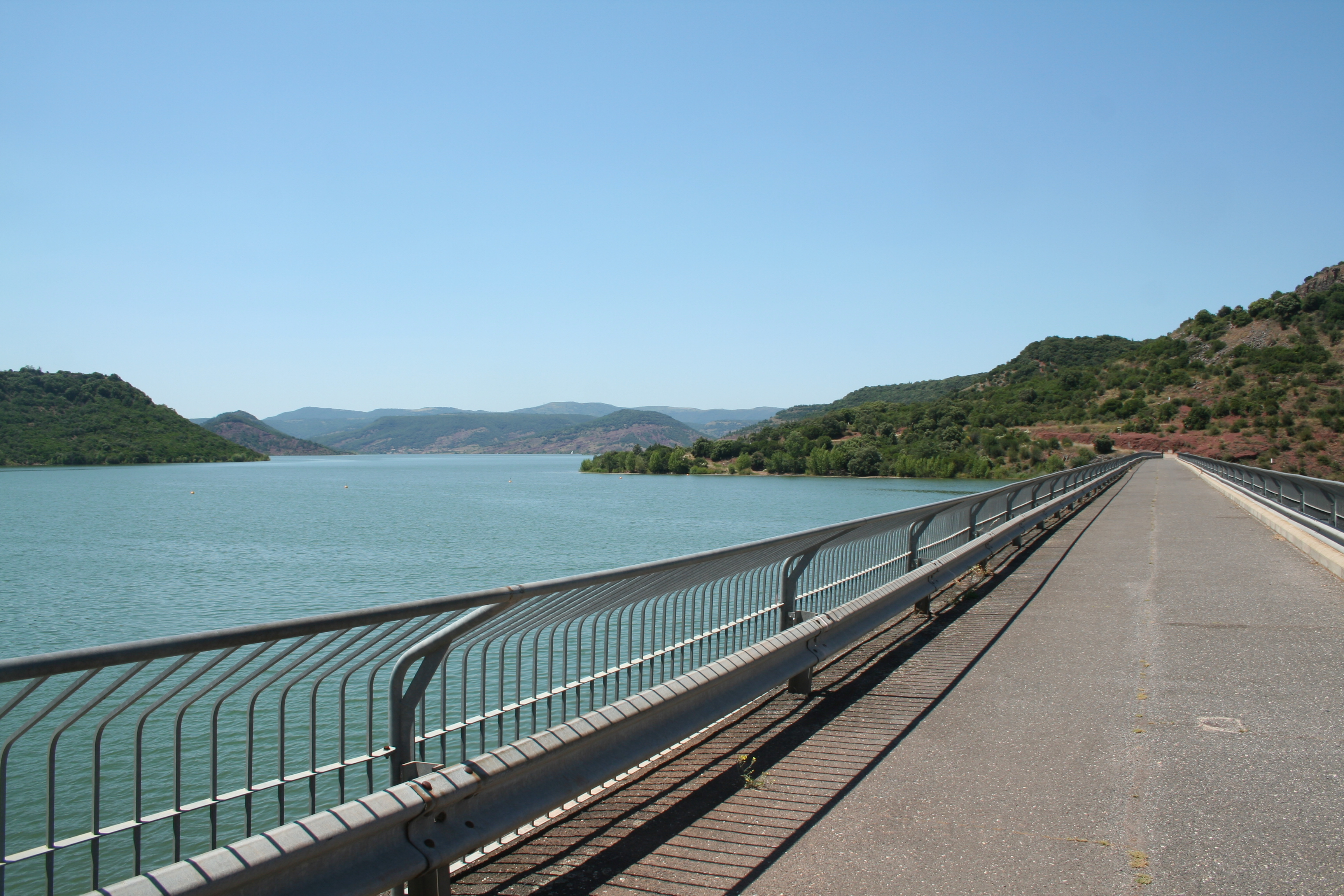 Clermont-l'Hérault (Hérault) - Lac du Salagou vu depuis le barrage.